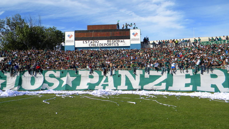 Fotografía de la barra Los Panzers, barra del Club de Fútbol Profesional Santiago Wanderers de Valparaíso.